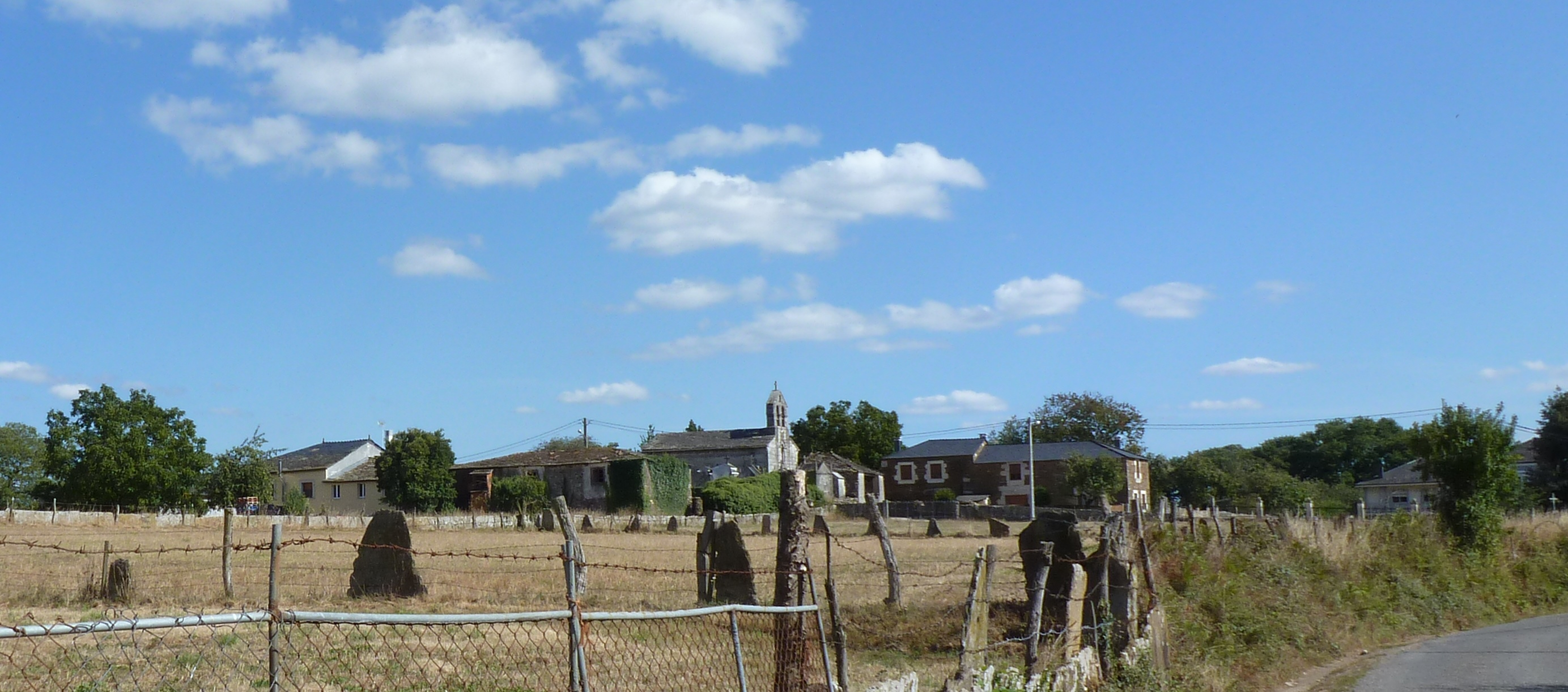 Lugar da Airexe, parroquia da Cervela, concello do Incio, Lugo